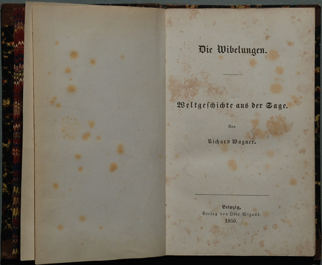 Titelblatt des Erstdruckes (1850)